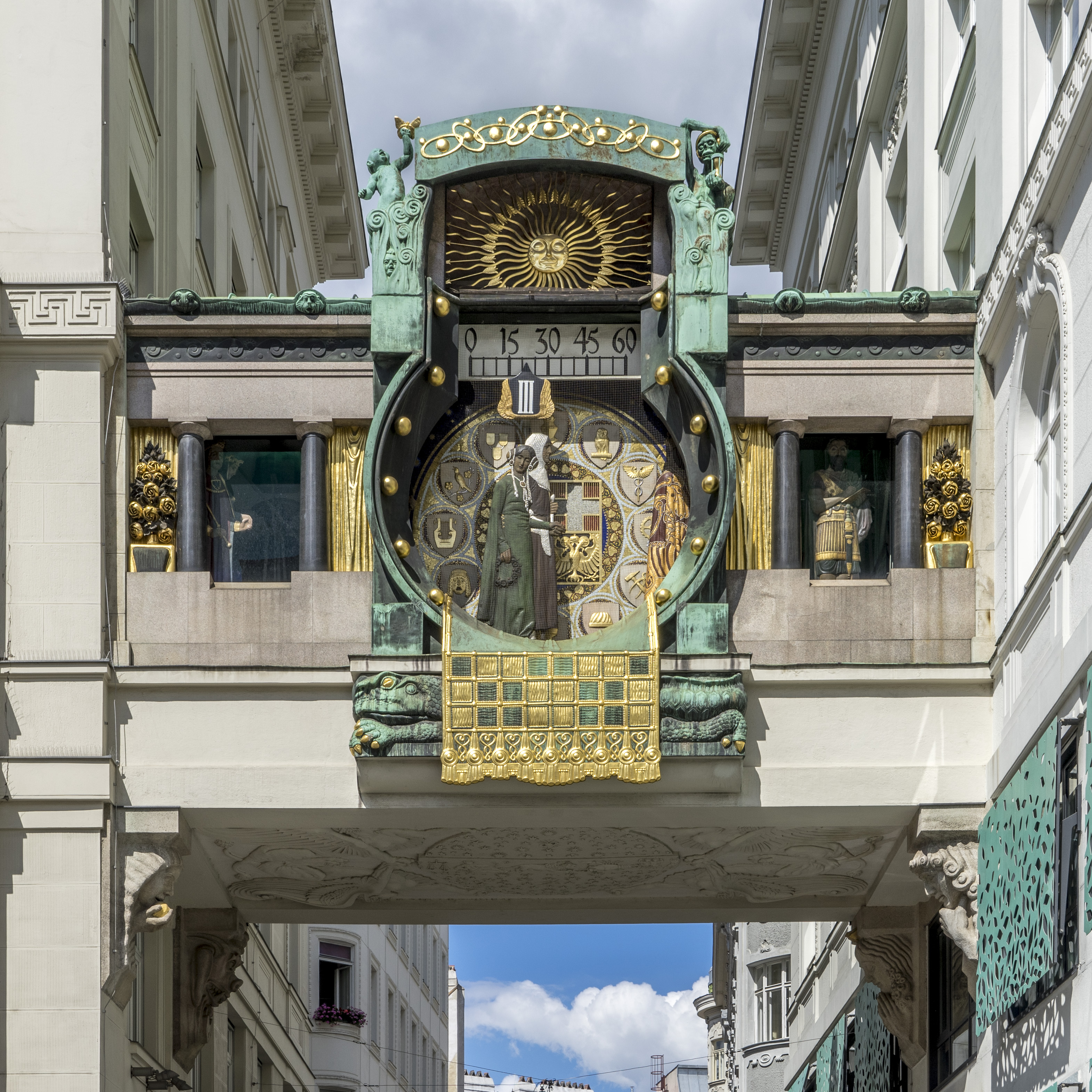 Ankeruhr, Hoher Markt, Vienna